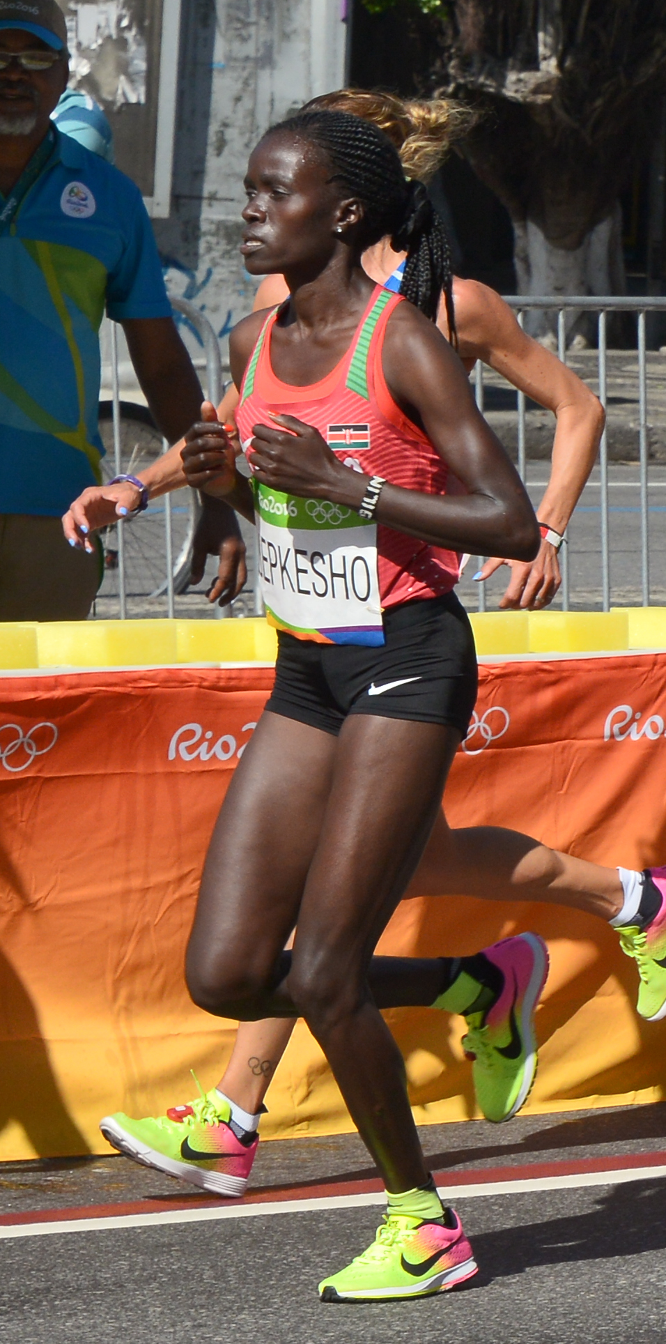 Passage du marathon des jeux olympiques de Rio 2016 dans le centre de Rio